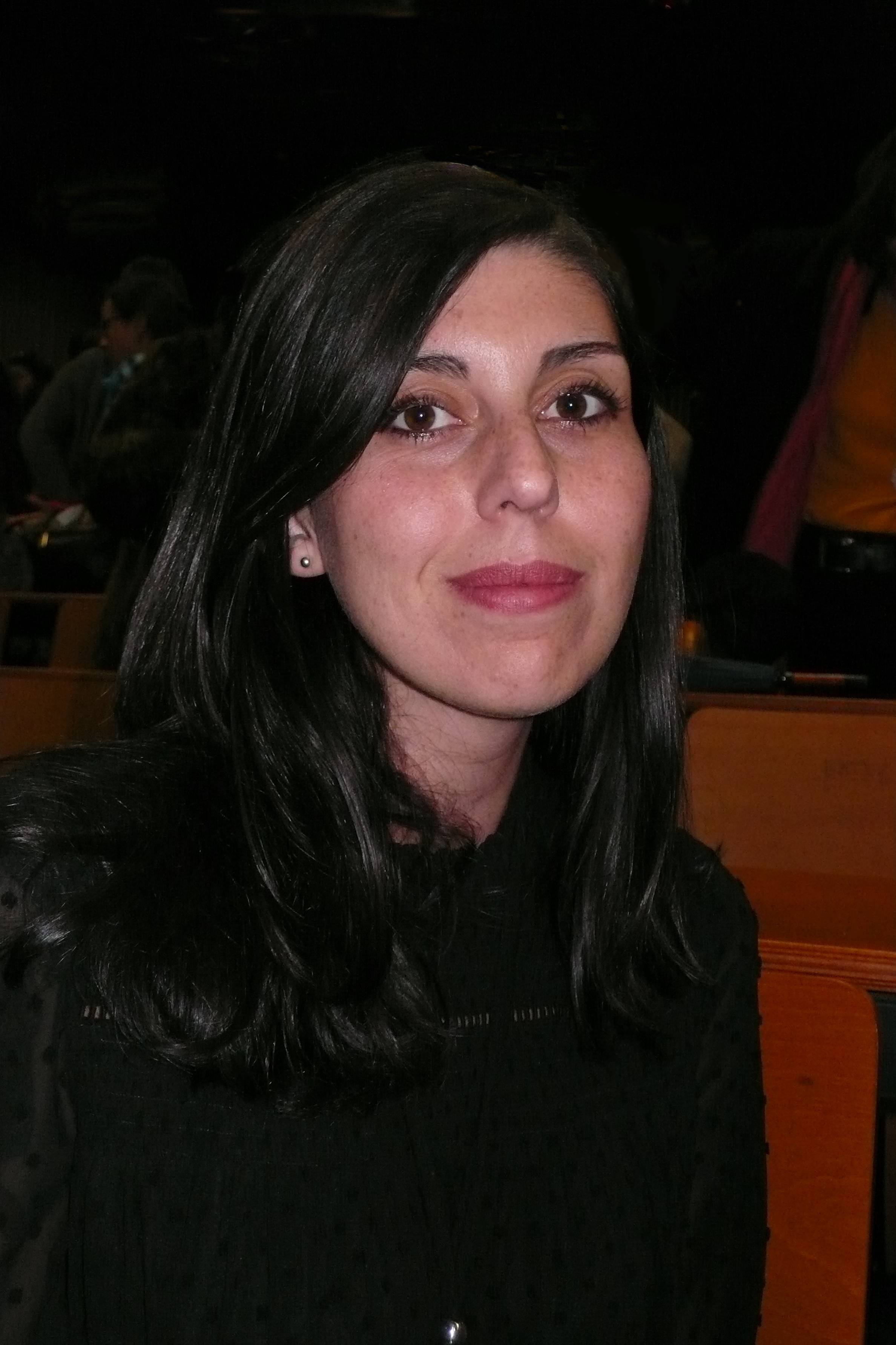 Valentina D'Urbano à l'Université de Nantes le 8 novembre 2016